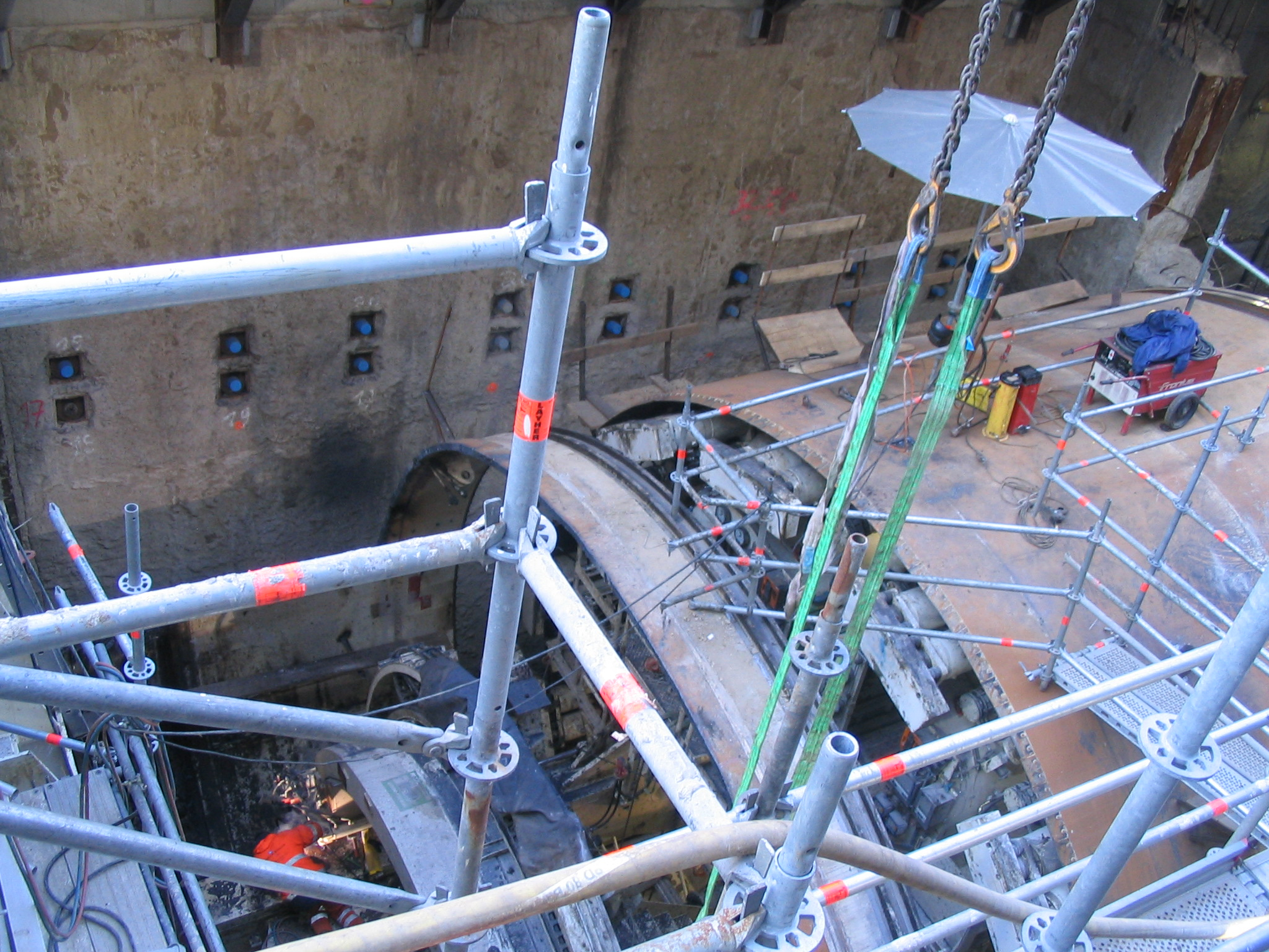 Bau des U-Bahn-Tunnels für die Wehrhahnlinie, Düsseldorf. Januar 2012 Der Bohrkopf wird auf dem Wehrhahn abgebaut.